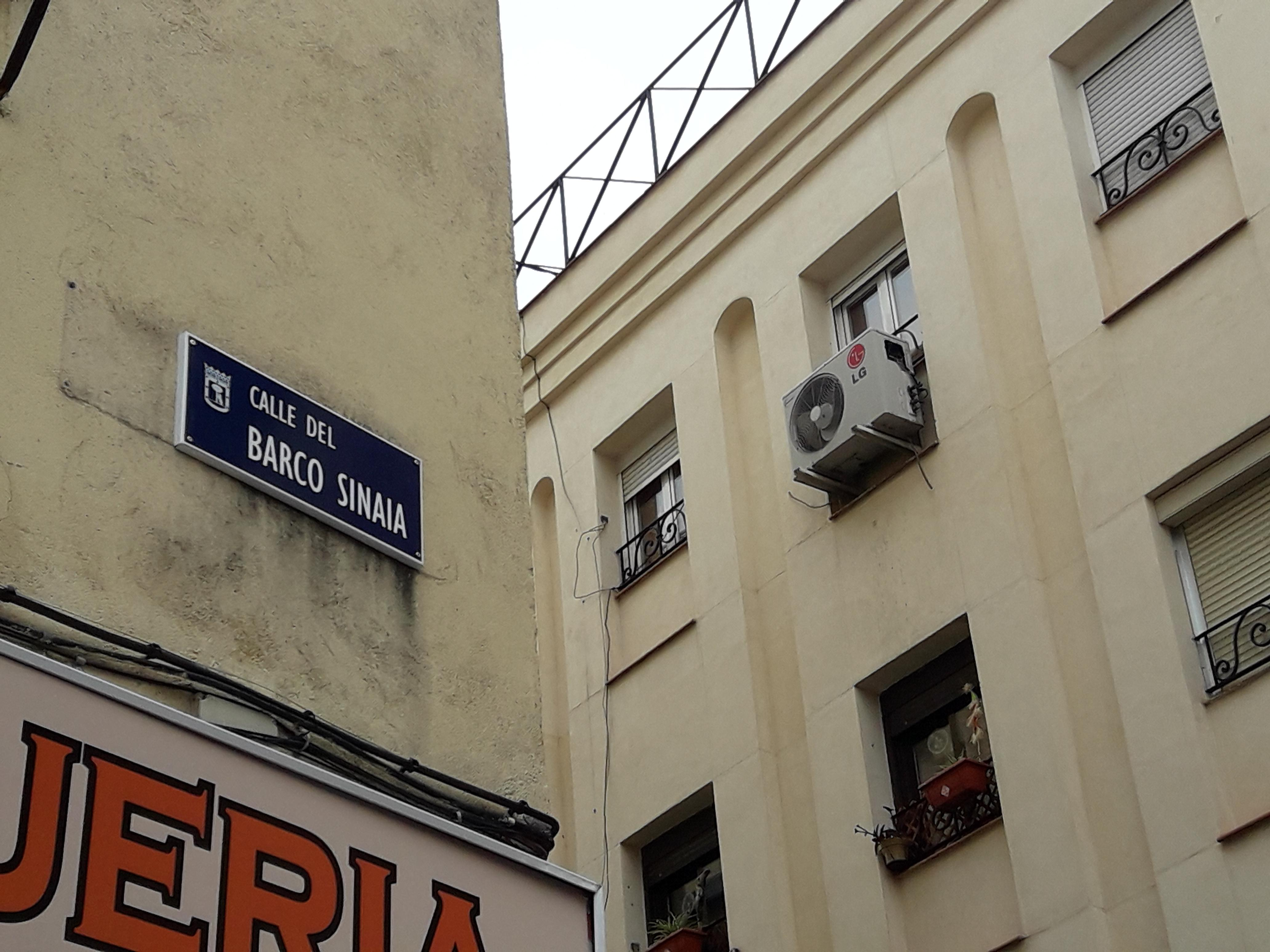 Con las recomendaciones realizadas por el Comisionado de la Memoria Histórica, el Pleno del Ayuntamiento de Madrid, en la sesión extraordinaria celebrada en abril de 2017, aprobó el cambio de denominación de calles, plazas y espacios públicos de la ciudad en las que se conmemoraba la sublevación militar, la Guerra Civil Española o la represión de la dictadura del General Franco. Tras el auto del Tribunal Superior de Justicia de Madrid, que desestimaba medidas cautelares contra este Acuerdo Plenario, el cambio de nombres en el callejero se ha hecho posible.